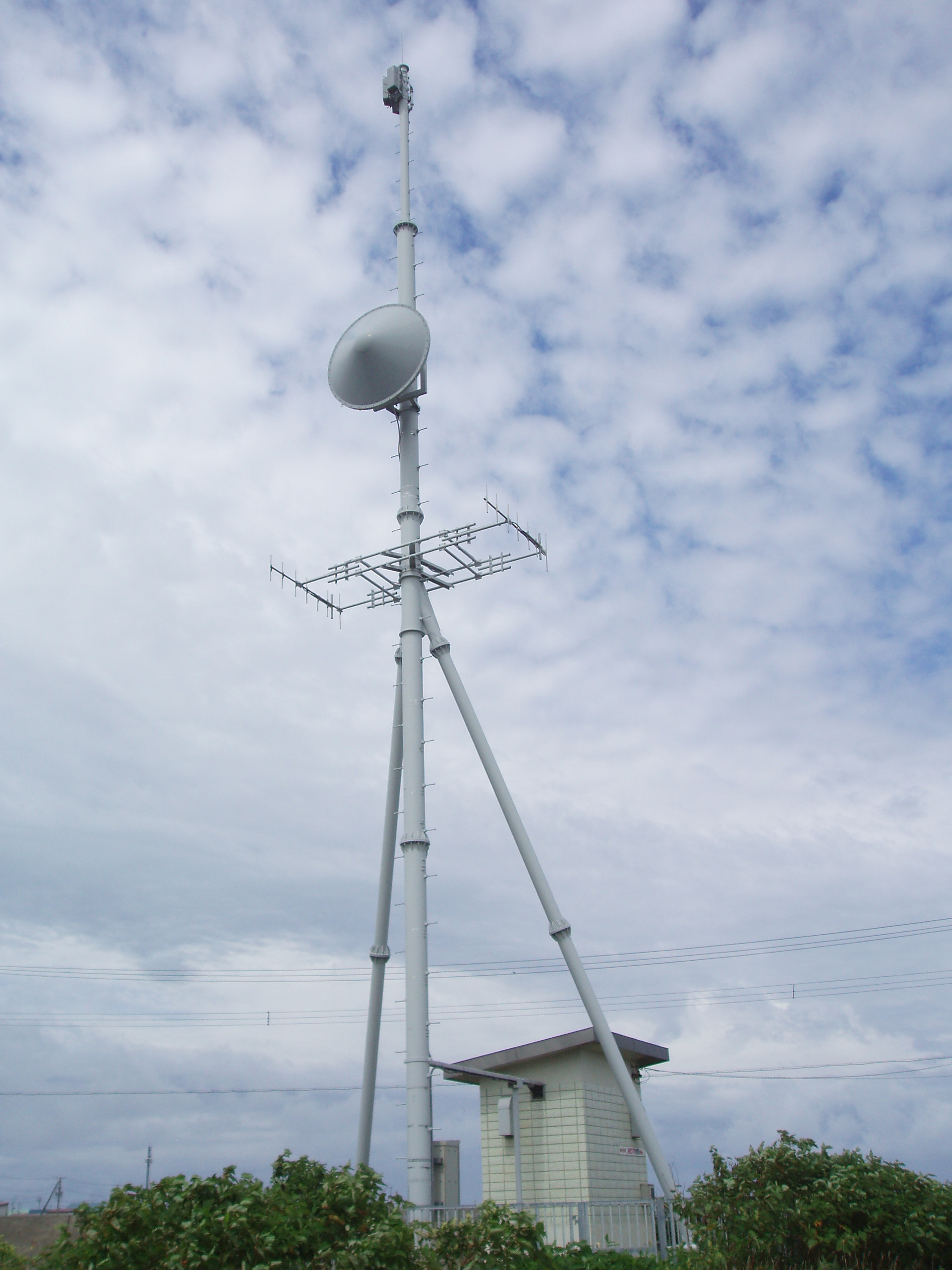 北稚内中継局 NHK・HBC・STV・HTB・UHB送信設備